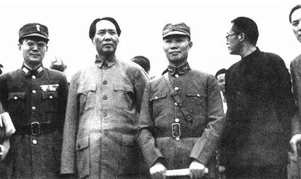 双十协定后,陈诚、张治中、陶行知等与毛泽东合影於重庆